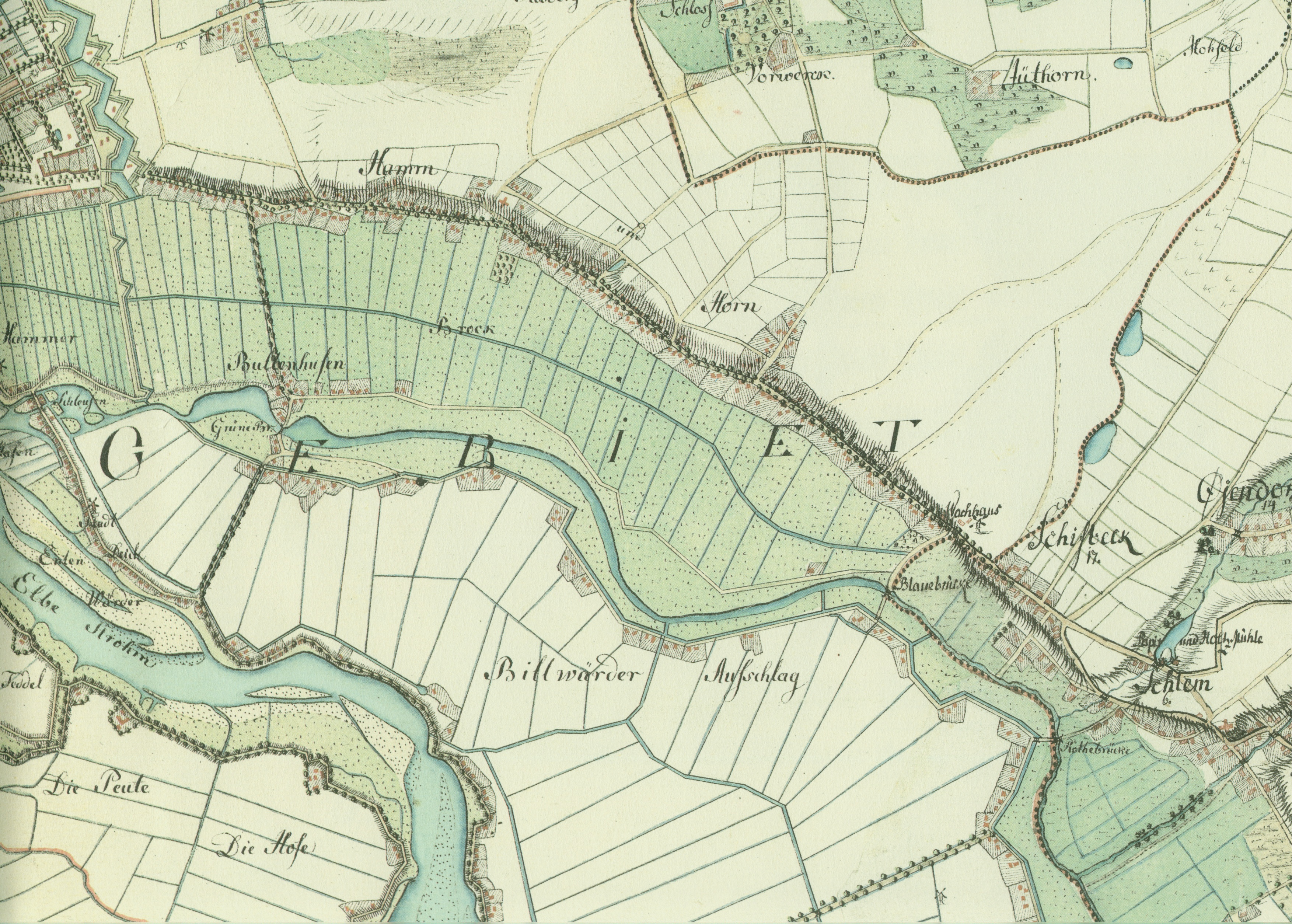 Varendorfsche Karte 63 (Ausschnitt Unterlauf der Bille) Topographisch-militärische Charte des Herzogtums Holstein. Aufgenommen in den Jahren von 1789 bis 1796 unter Leitung des Majors Gustav Adolf von Varendorf durch Offiziere des Schleswigschen Infanterieregimentes.